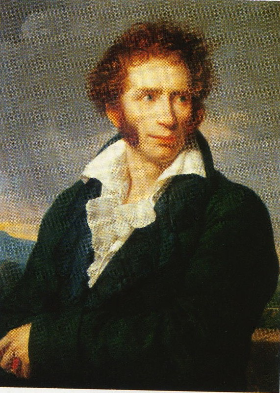 Ritratto di Ugo Foscolo